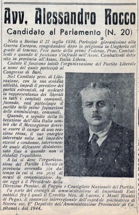 Candidatura alle Elezioni Politiche del 18 aprile 1948